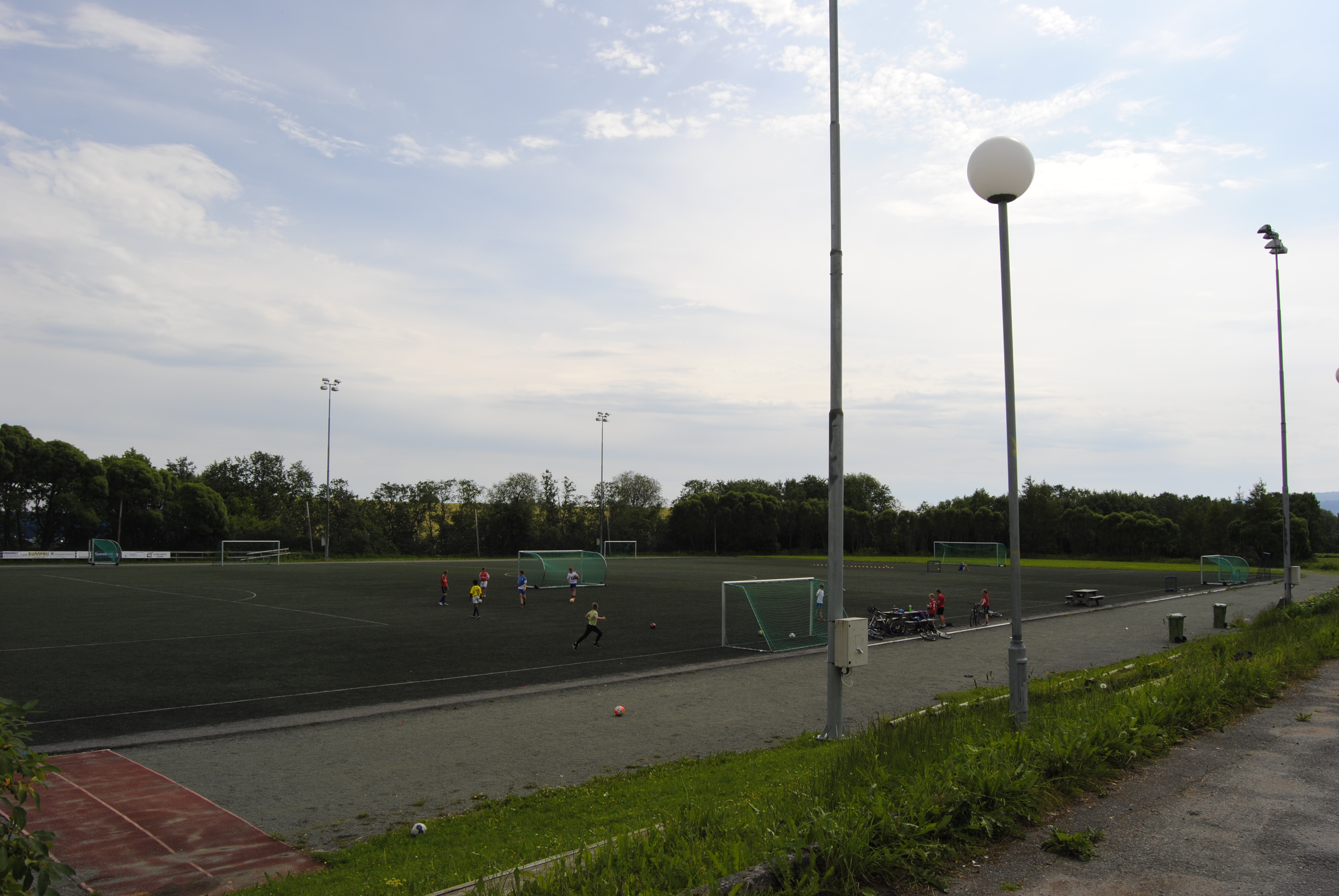 Stadsbygd Stadion, 2 juli 2015.